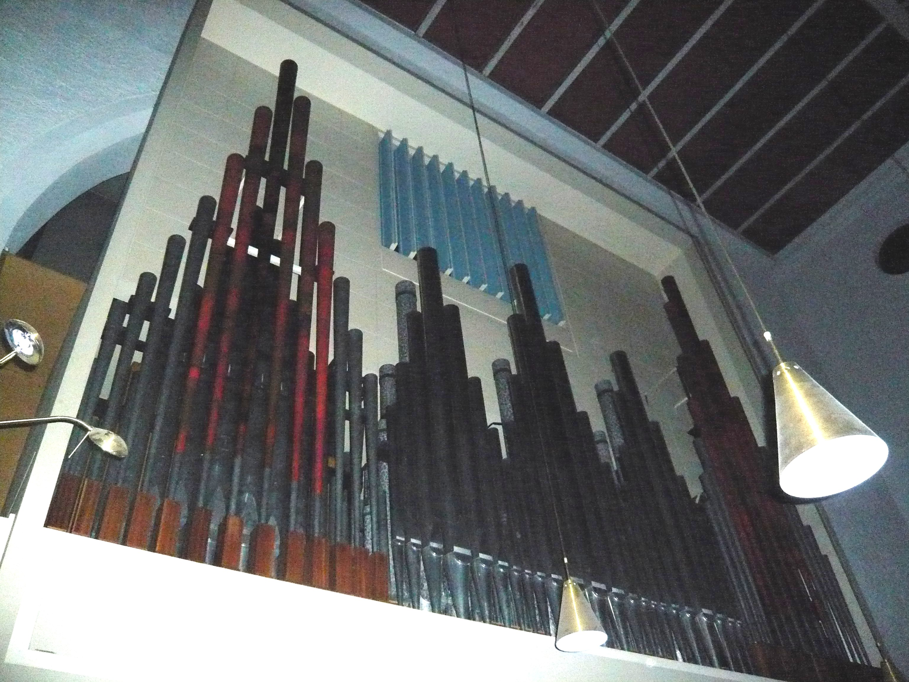 Erlöserkirche Berlin-Moabit